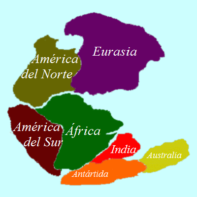 El supercontinente Pangea incluyendo la placa antártica antes de que esta se escindiera debido a la deriva continental o tectónica.